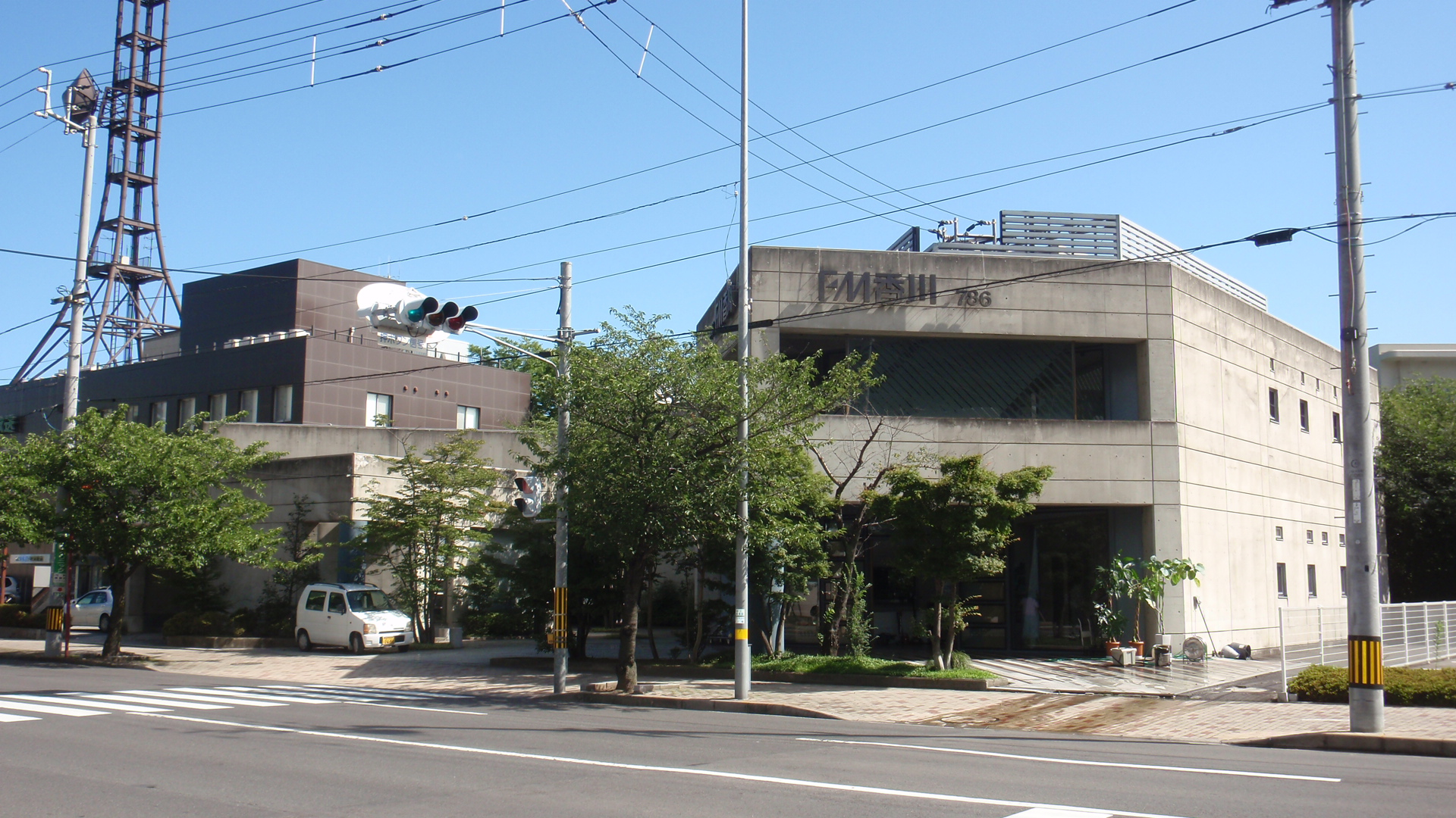 香川県高松市瀬戸内町にあるFM香川本社。